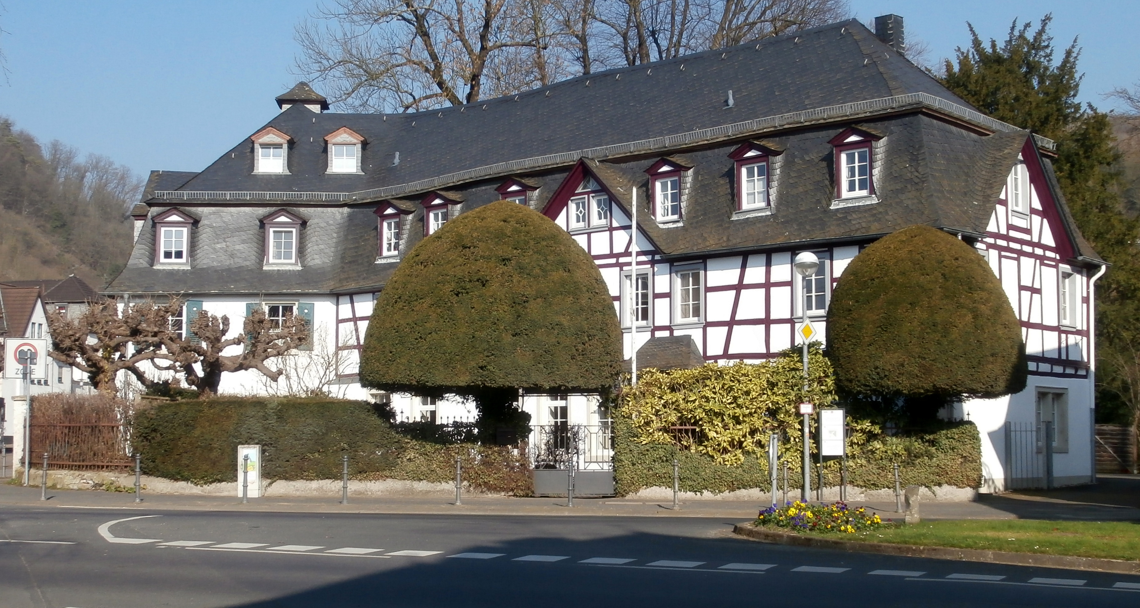 Ehemaliges Hotel Wolkenburg, Drachenfelsstraße 2, Rhöndorf, Bad Honnef: Ansicht von der Einmündung der Karl-Broel-Straße in die Rhöndorfer Straße